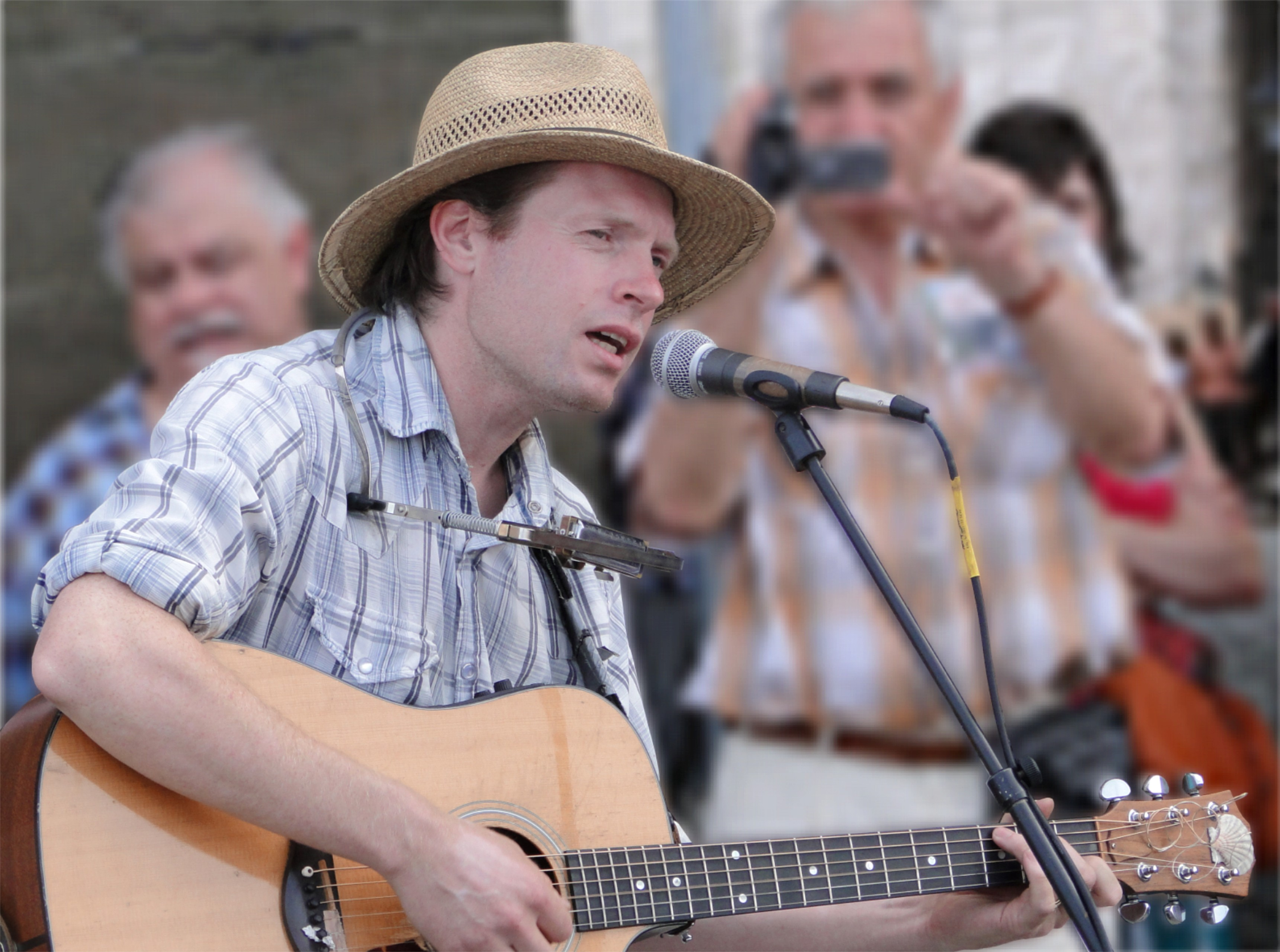 Jimmy Kelly von der Kelly Family während eines Straßenkonzerts im August 2009